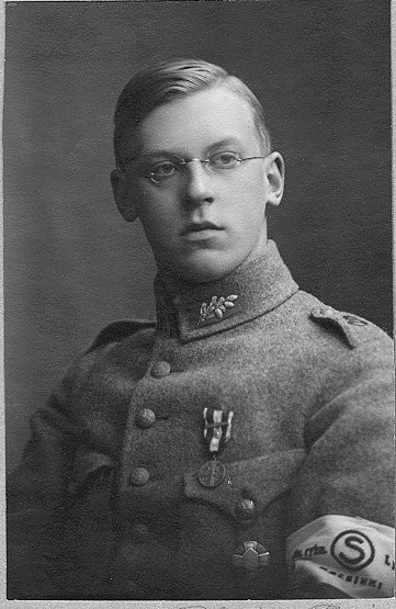 Rauno Gustaf Ilmari Kallia vuonna 1918